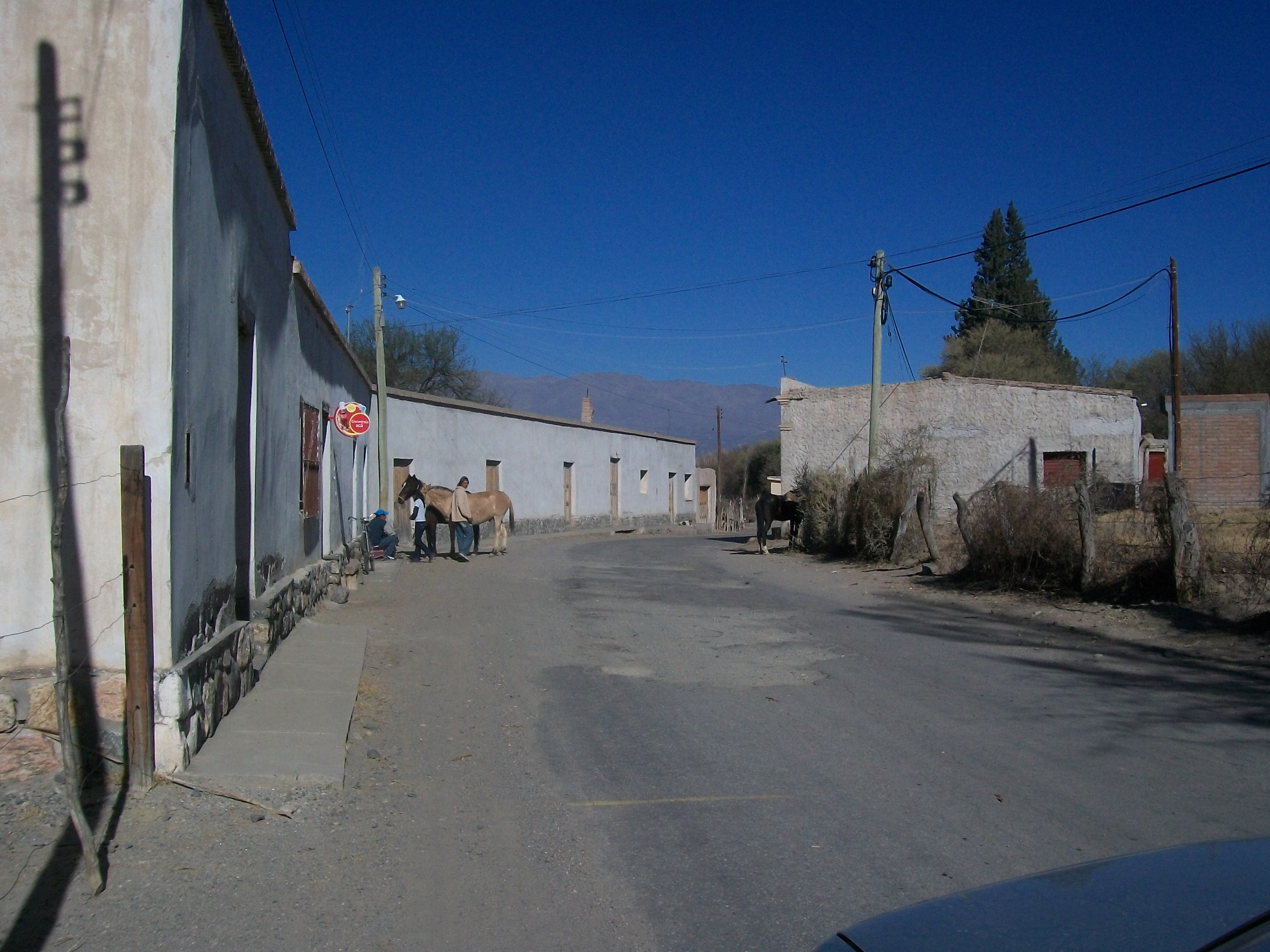 Tramo de la ruta 40 que pasa por la localidad de Fuerte Quemado, Catamarca (departamento de Santa María de Yokavil), muy próximo al límite con Tucumán, Argentina